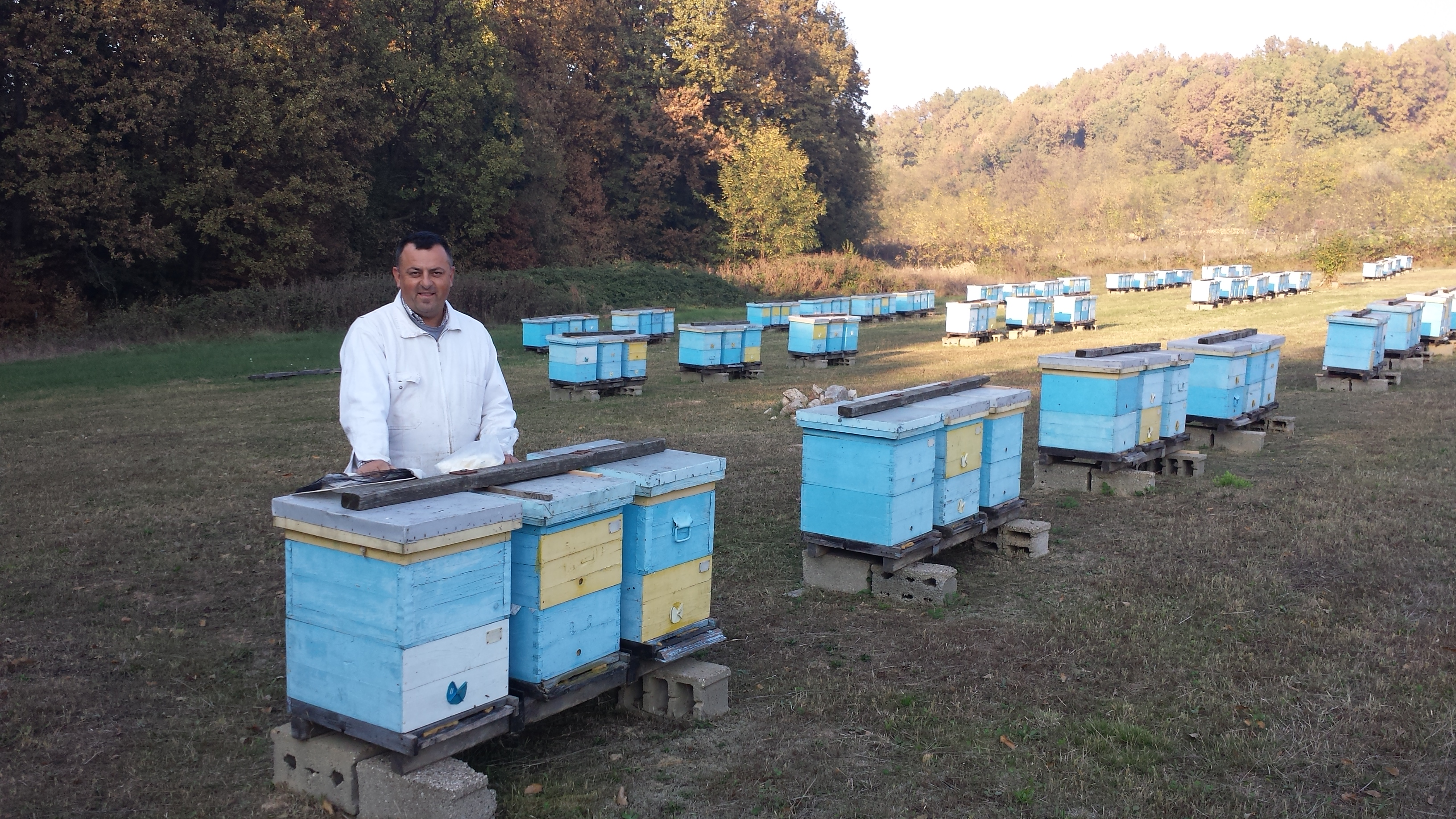 Pčelar